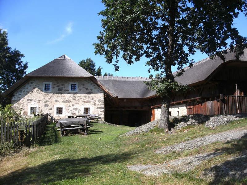 Dreiseithof, Freilichtmuseum in Rechberg (Naturpark Mühlviertel) Oberösterreich